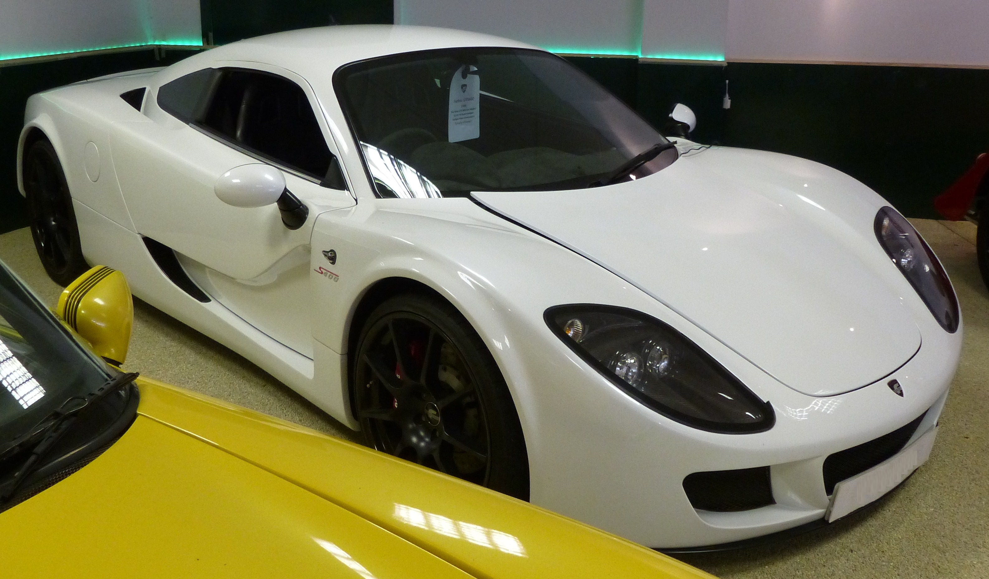 Farbio GTS 400 2008